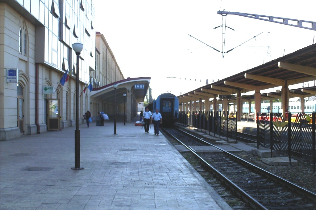 Gara din Iaşi.